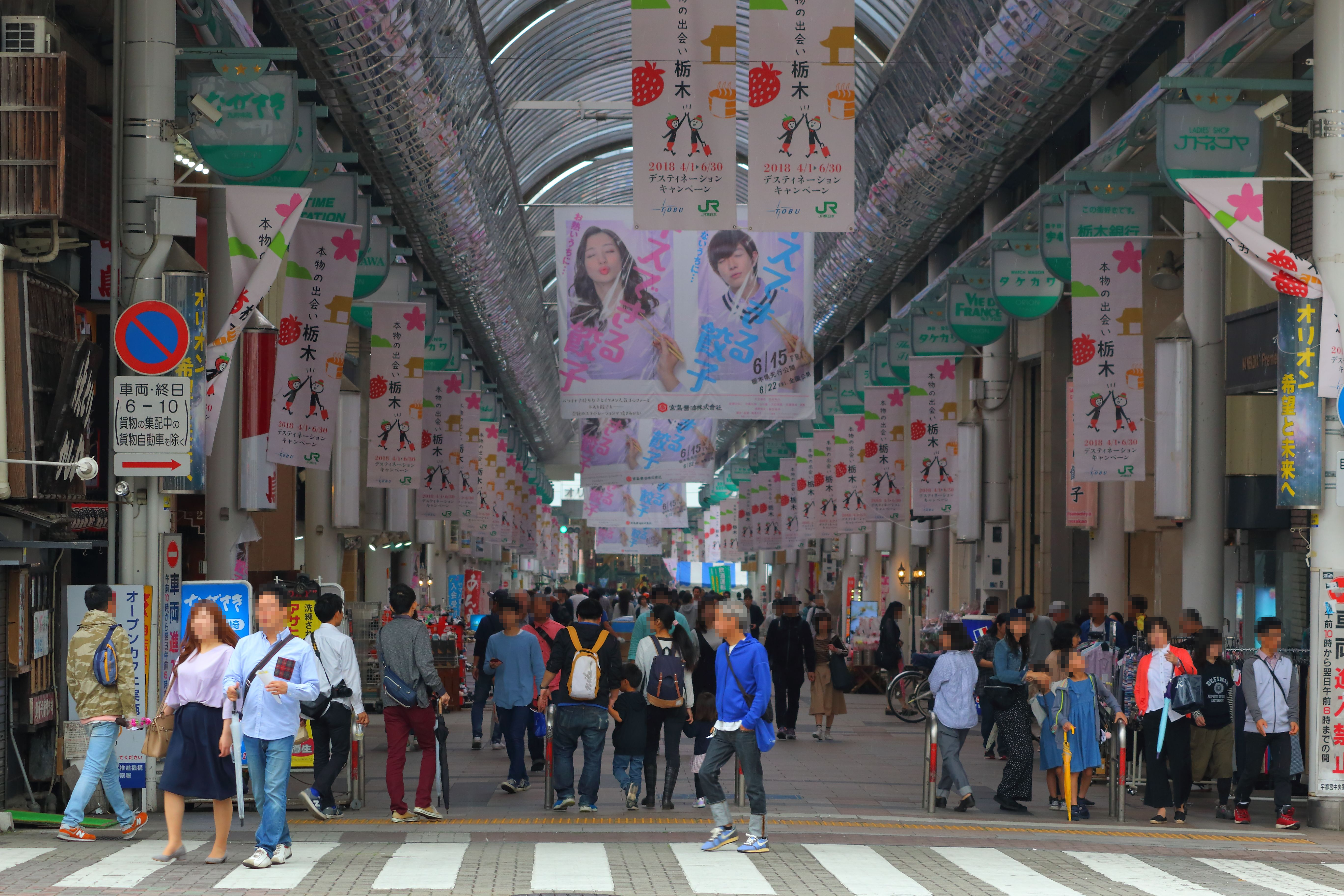 オリオン通り西側の様子（2018年5月）